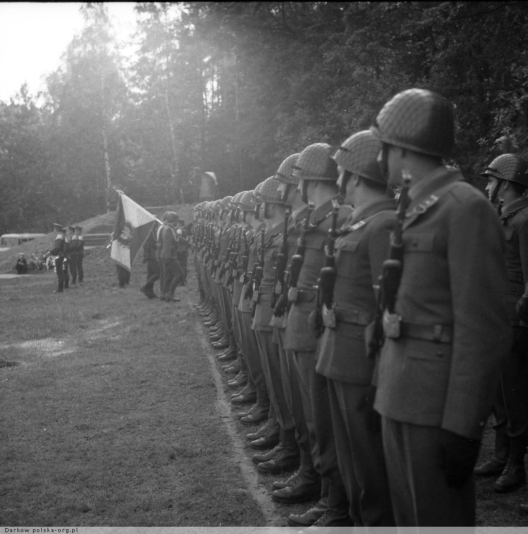 VI Zlot Kombatantow Ziemi Lwoweckiej Lwowek Slaski